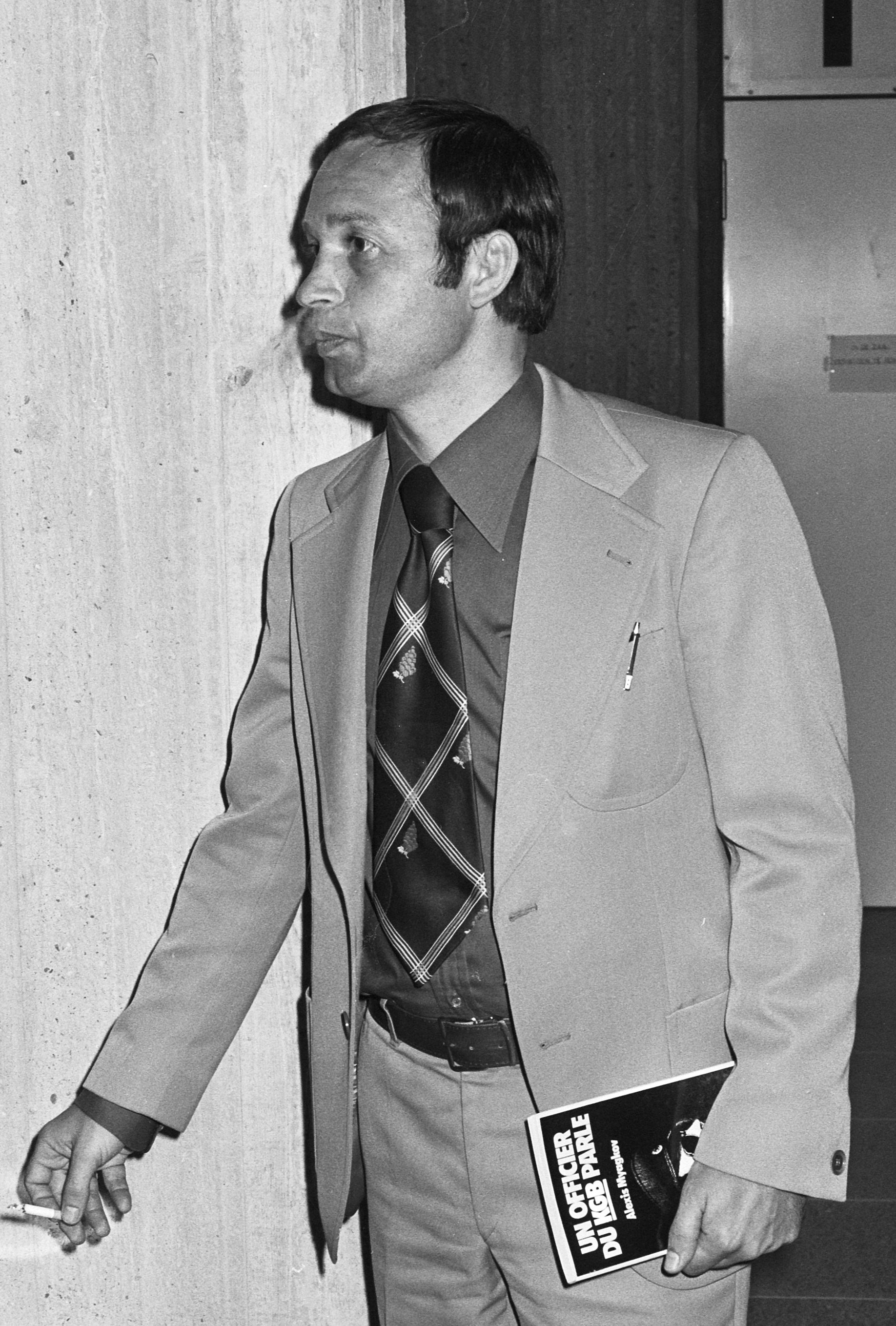 Proces Menten, Amsterdam; een ex KGB-agent Myagkov